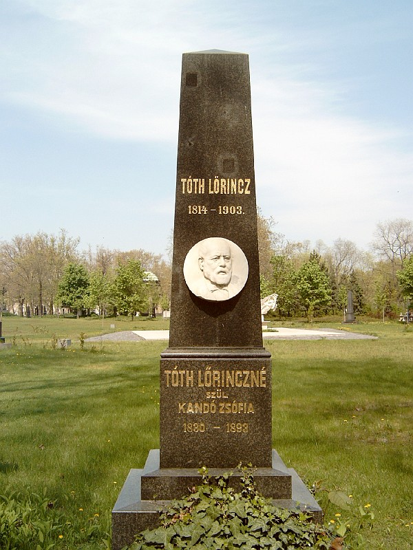 Tóth Lőrinc (Komárom, 1814. december 17. – Budapest, 1903. március 17.) író, jogtudós sírja Budapesten. Kerepesi temető: 28-díszsor-39 [kivitelező: Gerenday-cég].